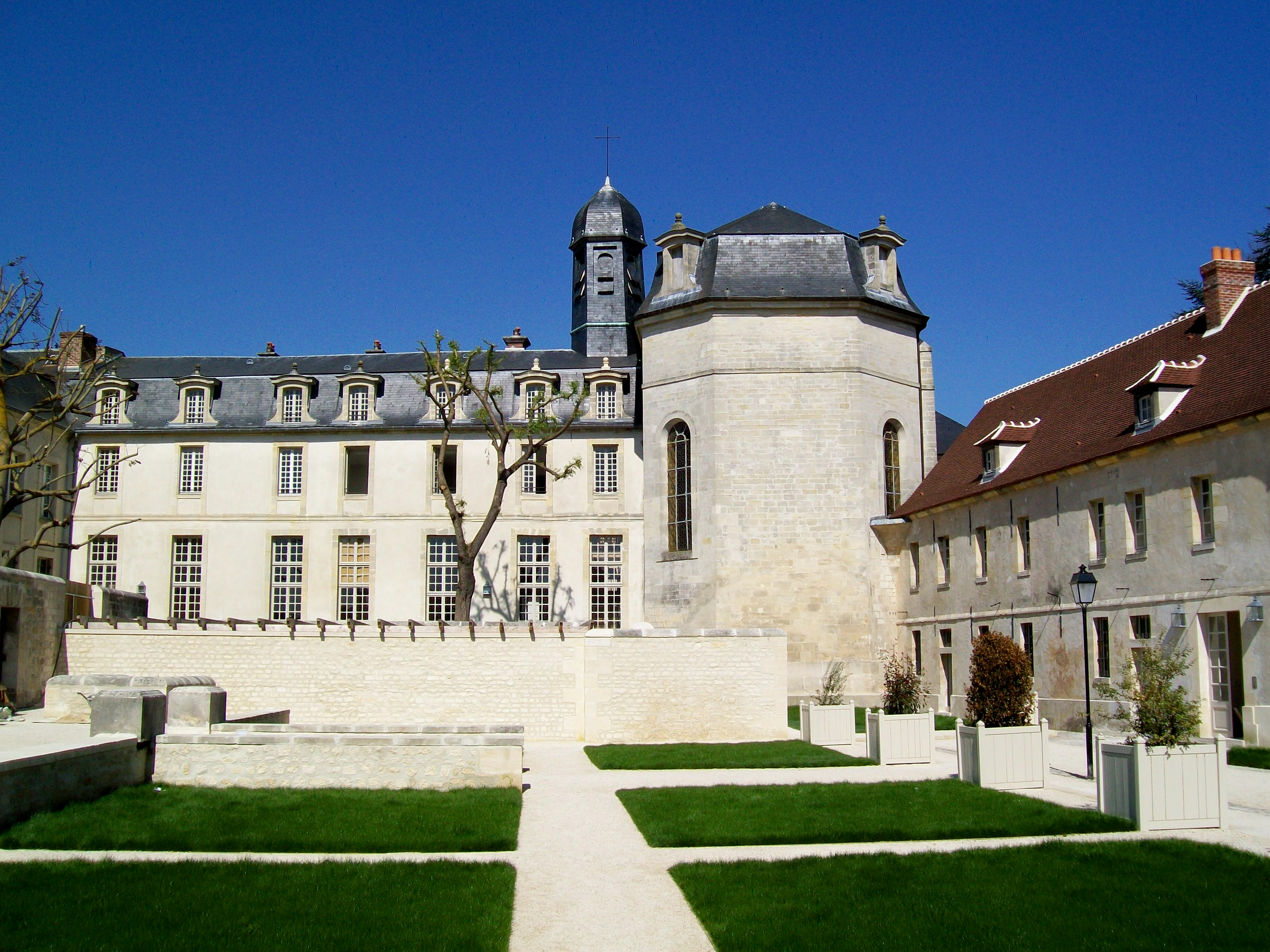 Le bâtiment de l'infirmerie et de « la Liberté » (nom avant la construction du nouveau bâtiment conventuel en 1764-71) et l'église, dont la construction a commencé en 1706. Vue depuis le jardin de l'hôpital, jadis destiné aux patients.